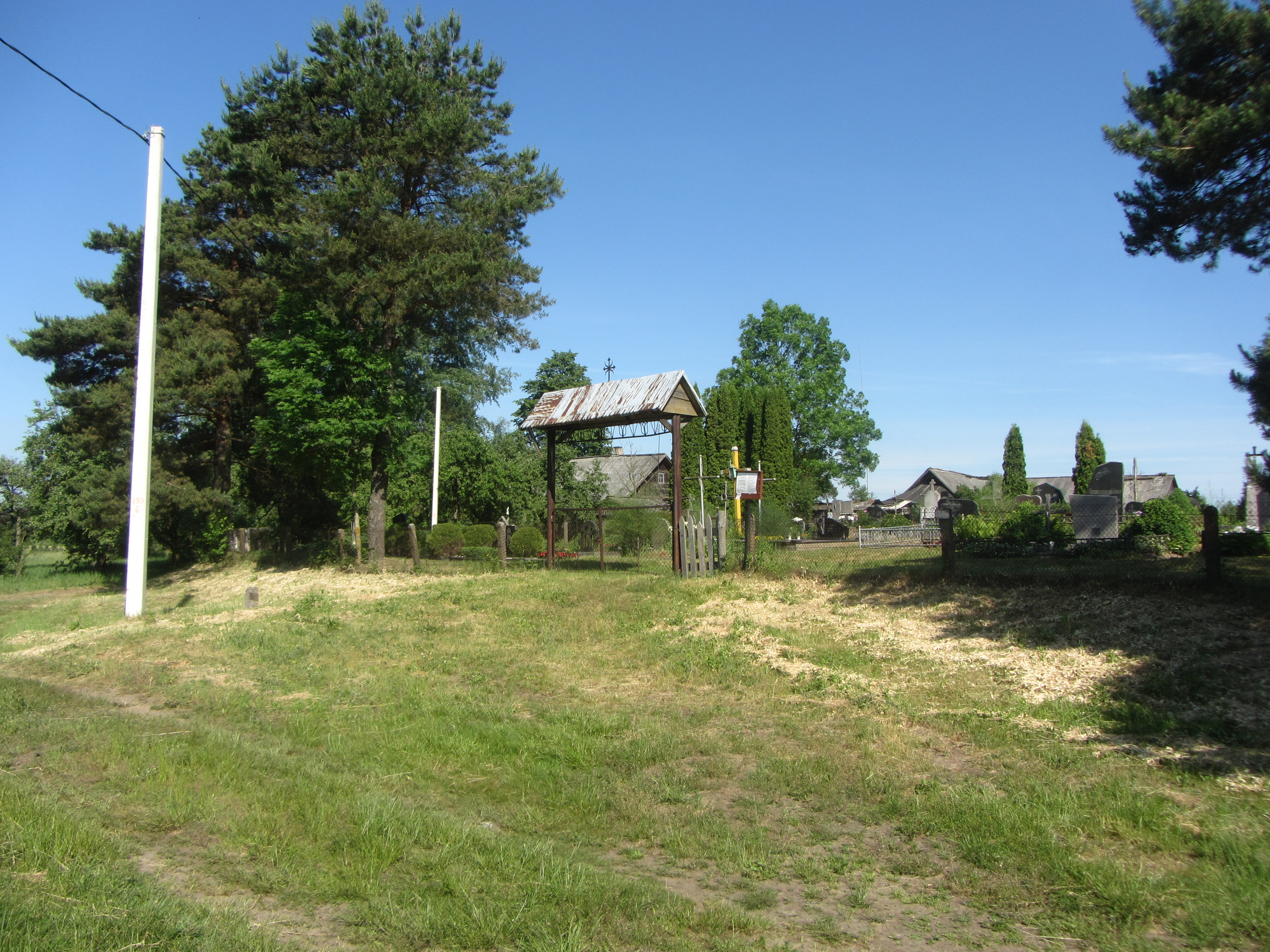 Žiežmarių apylinkės sen., Lithuania